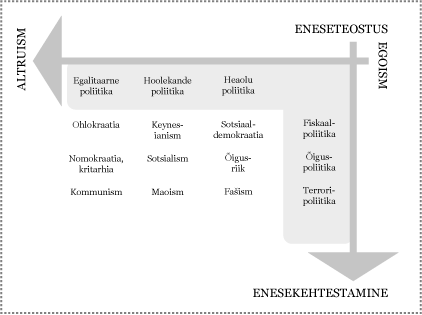 Bürokratismi ideoloogiad, sotsiaalriigi poliitikad